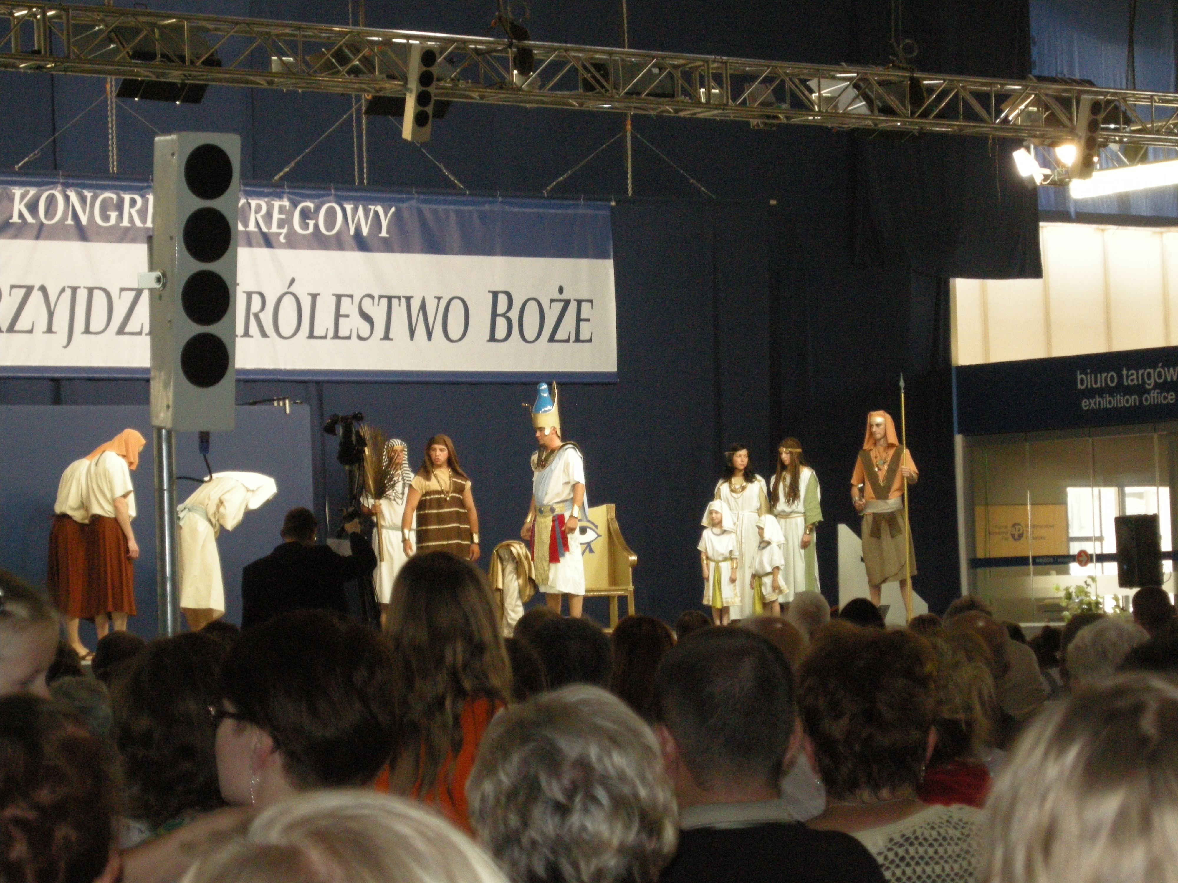 Drama biblijny na zgromadzeniu okręgowym Świadków Jehowy w Poznaniu na Międzynarodowych Targach Poznańskich w 2011 w Polsce